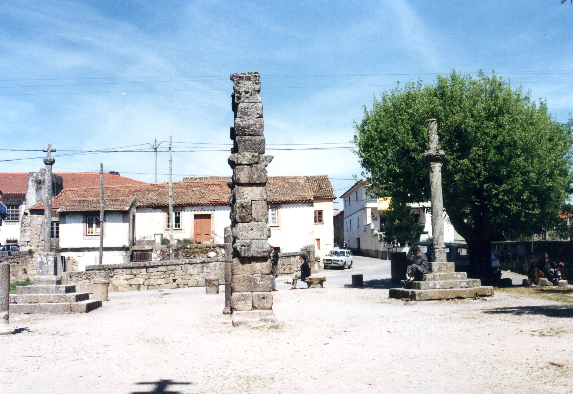 Pelourinho de Bobadela This file was uploaded for Wiki Loves Monuments in Portugal with the unique identifier 73332.